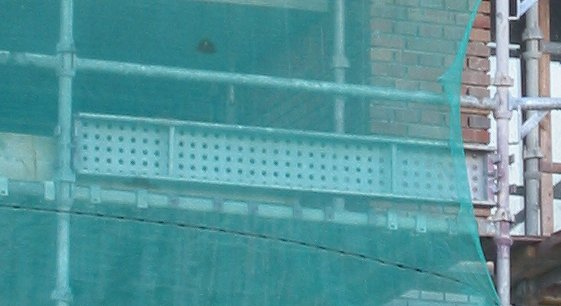 (Steigerplank) Scaffold shelf